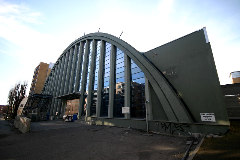 Bjølsenhallen i Oslo